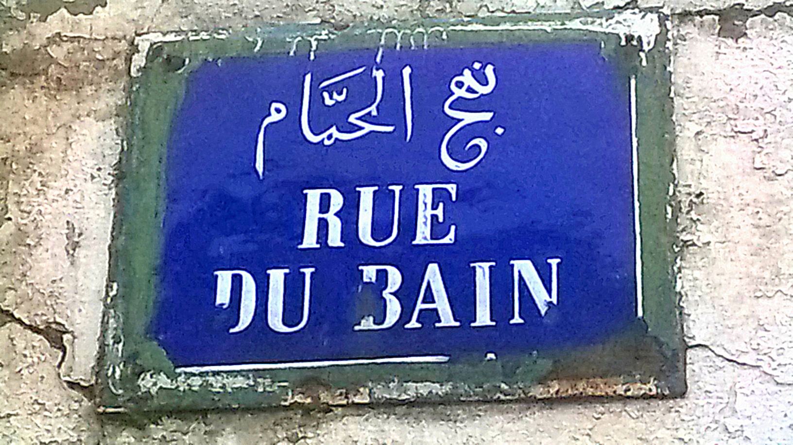 La médina de Tunis مدينة تونس العتيقة